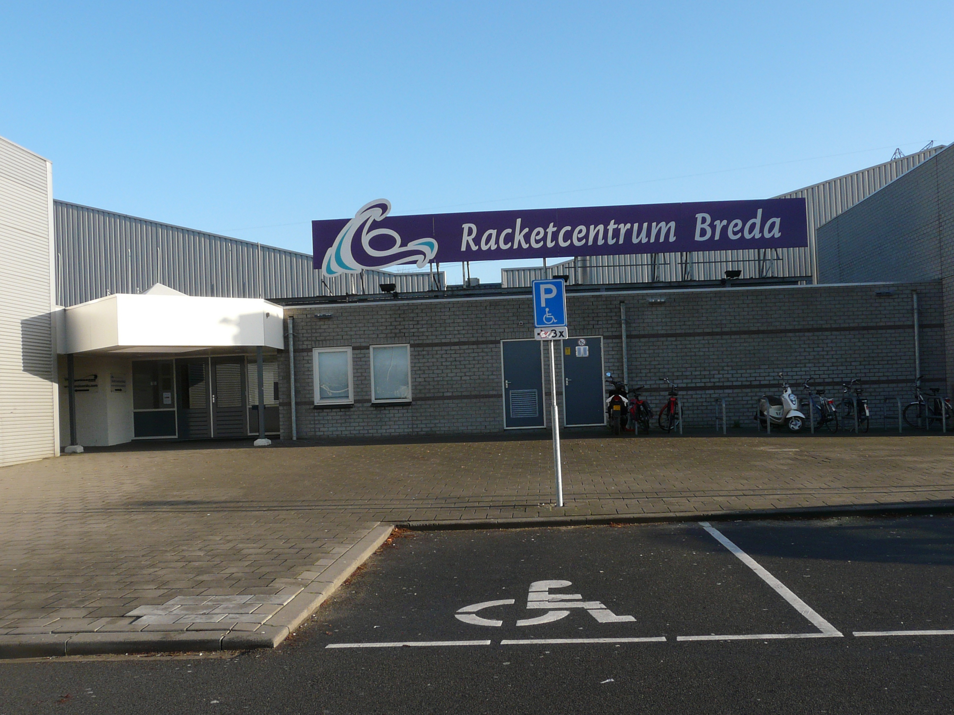 Racketcentrum op sportboulevard de Wisselaar in Breda Noord in Breda